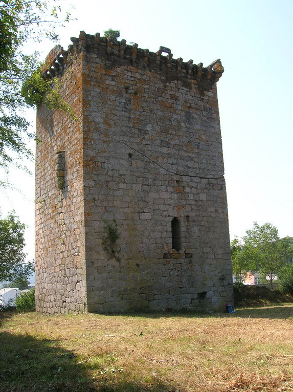 Del Castillo Fortaleza de Castroverde o Castillo de los Altamira, construido sobre las ruinas de un viejo castro, tan sólo se conserva la Torre del Homenaje, de 20 metros de altura, y las ruinas de las murallas. Por los restos que se conservan se sabe que el castillo contaba con dos fosos, un patio de armas y uno de honor.